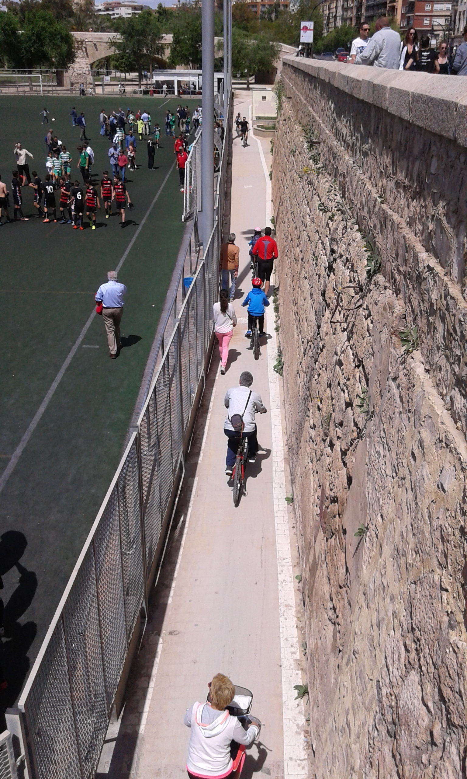 Carril bici del Jardí del Túria, marge esquerre, des del Pont de Fusta